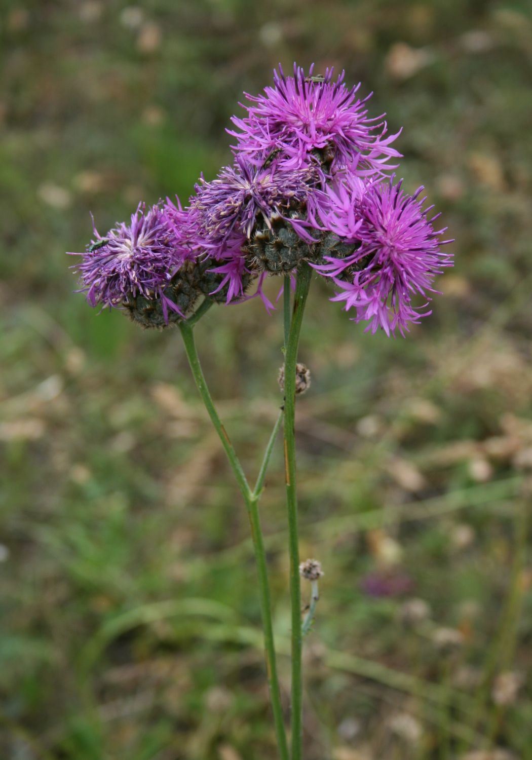 Ungarische Skabiosen-Flockenblume (Centaurea scabiosa subsp. sadleriana), Korbblütler (Asteraceae) - Ungarn/Magyarország/Hungary: Pest megye, Szénás-Hügel bei Pilisszentiván